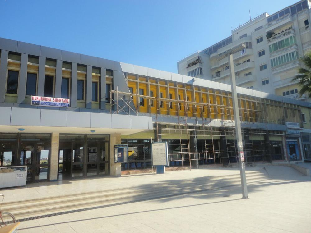 Kopfbahnhof, Durres, Albanien, 2014